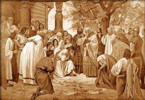 Věnceslav Černý - Příchod věrozvěstů Cyrila a Metoděje na Moravu